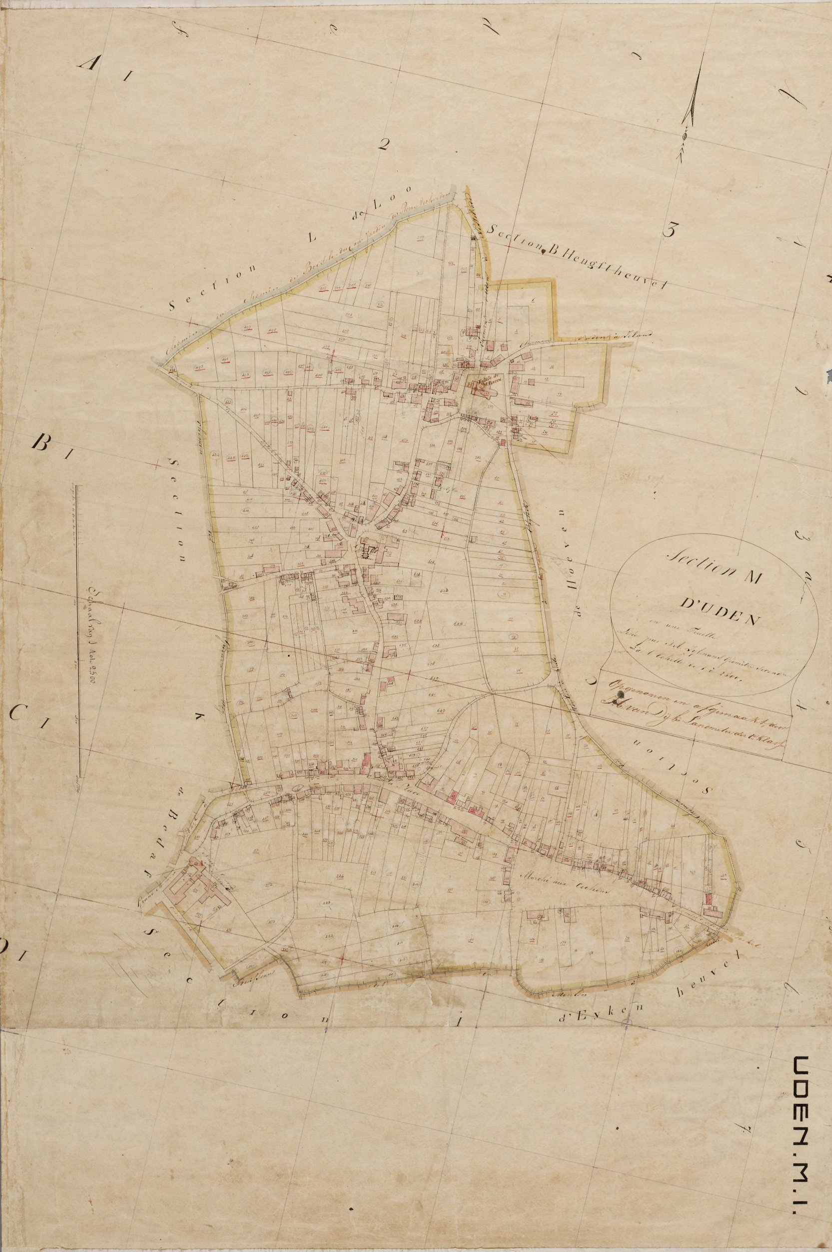 Kadasterkaart 1811 Uden Section M Uden centrum